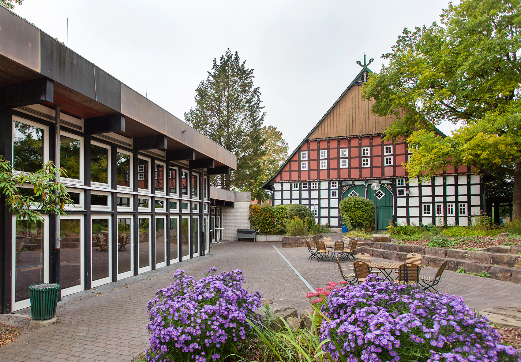 LWL-Bildungsstätte Jugendhof in Vlotho